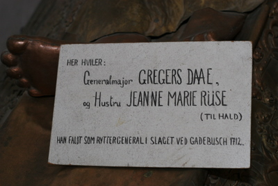 Foto fra Gregers Daas gravmæle.